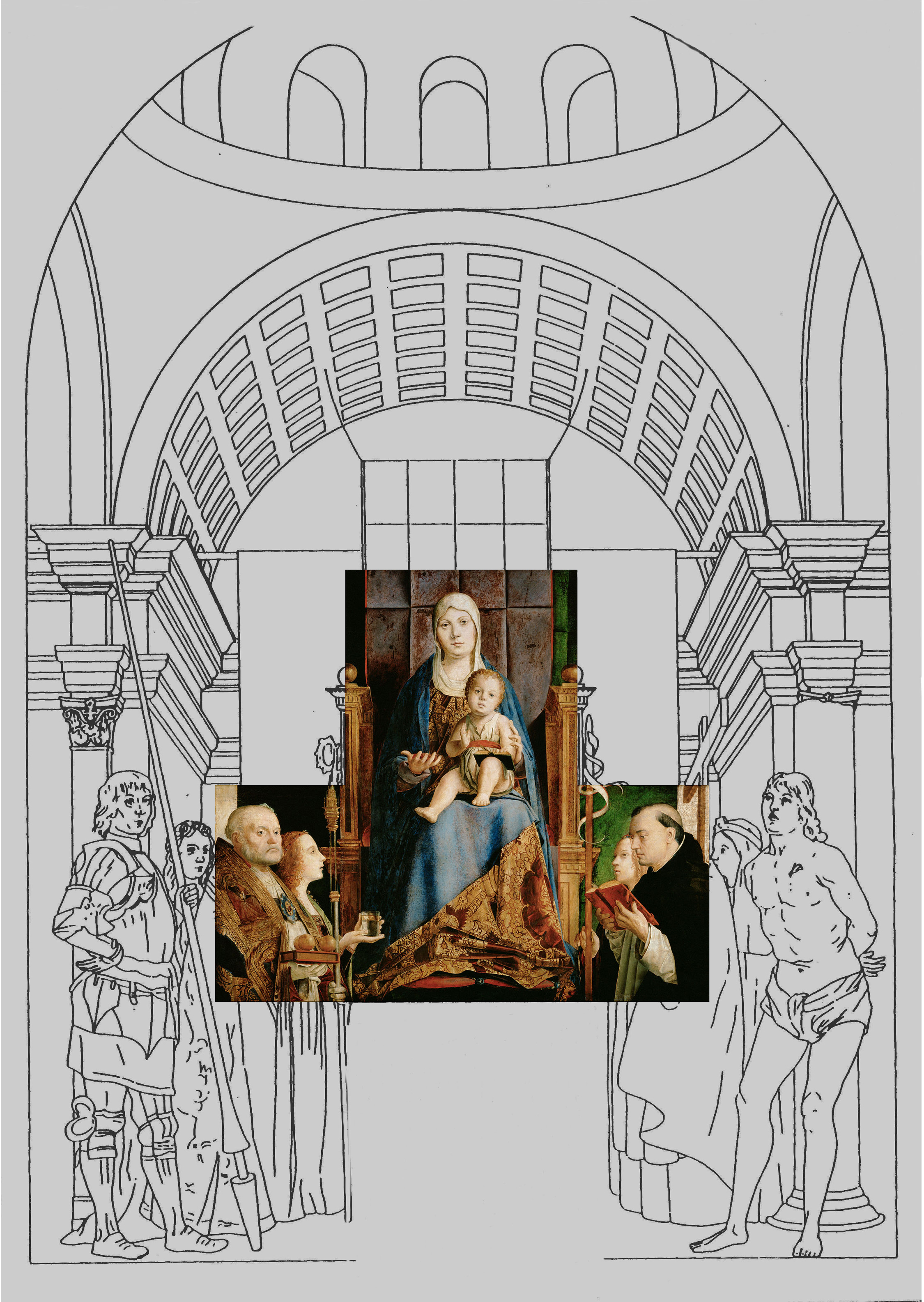 Reconstitution du retable de San Cassiano d'Antonello da messina